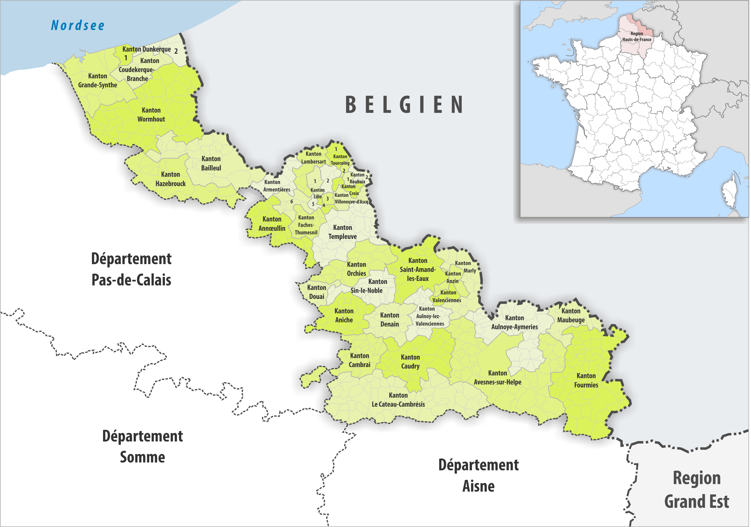 Gemeinden und Kantone im Departement Nord